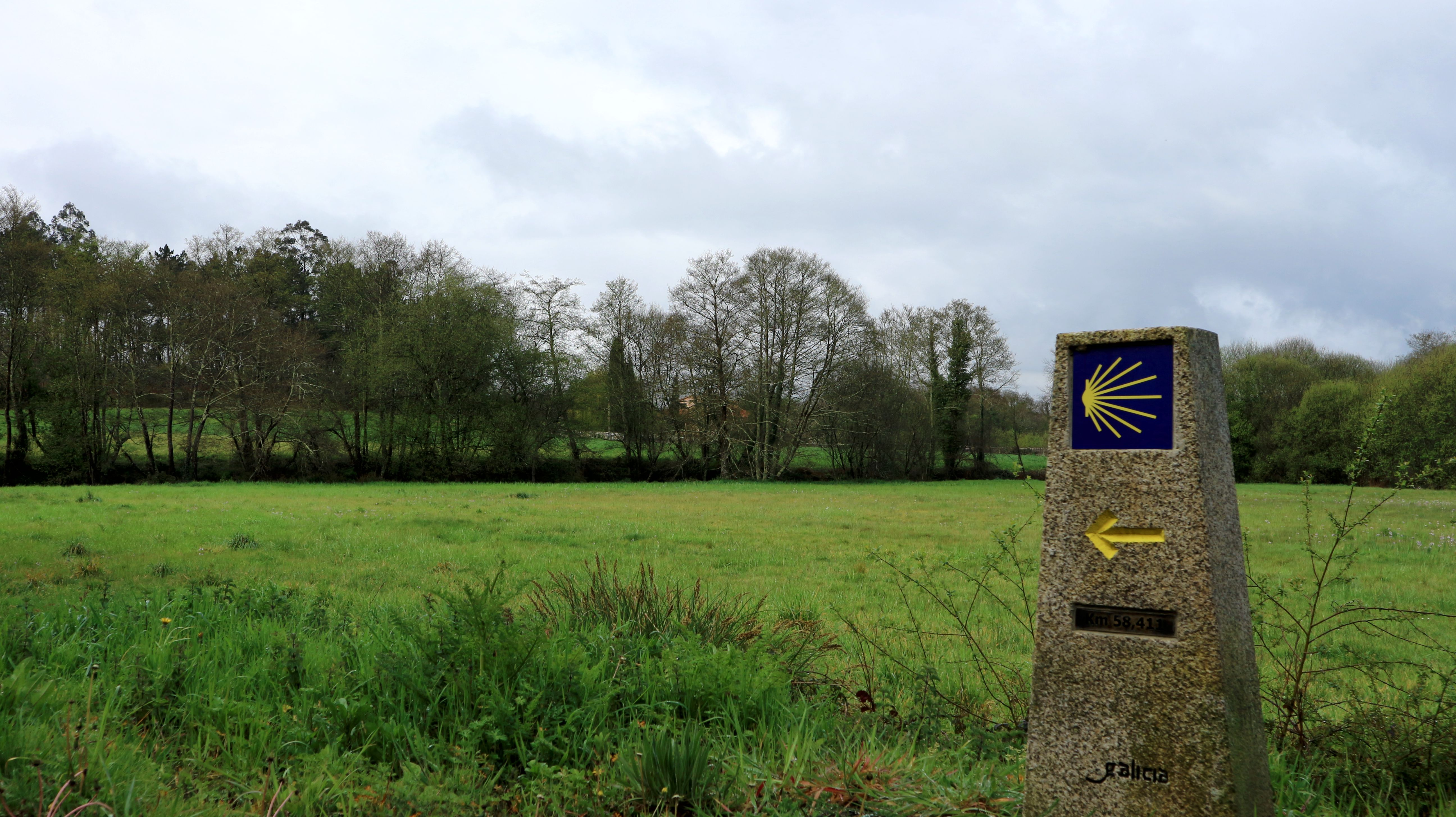 Sinal do Camiño Inglés á súa entrada de Cos desde Limiñón, á beira do río Mero. Cos, Abegondo.